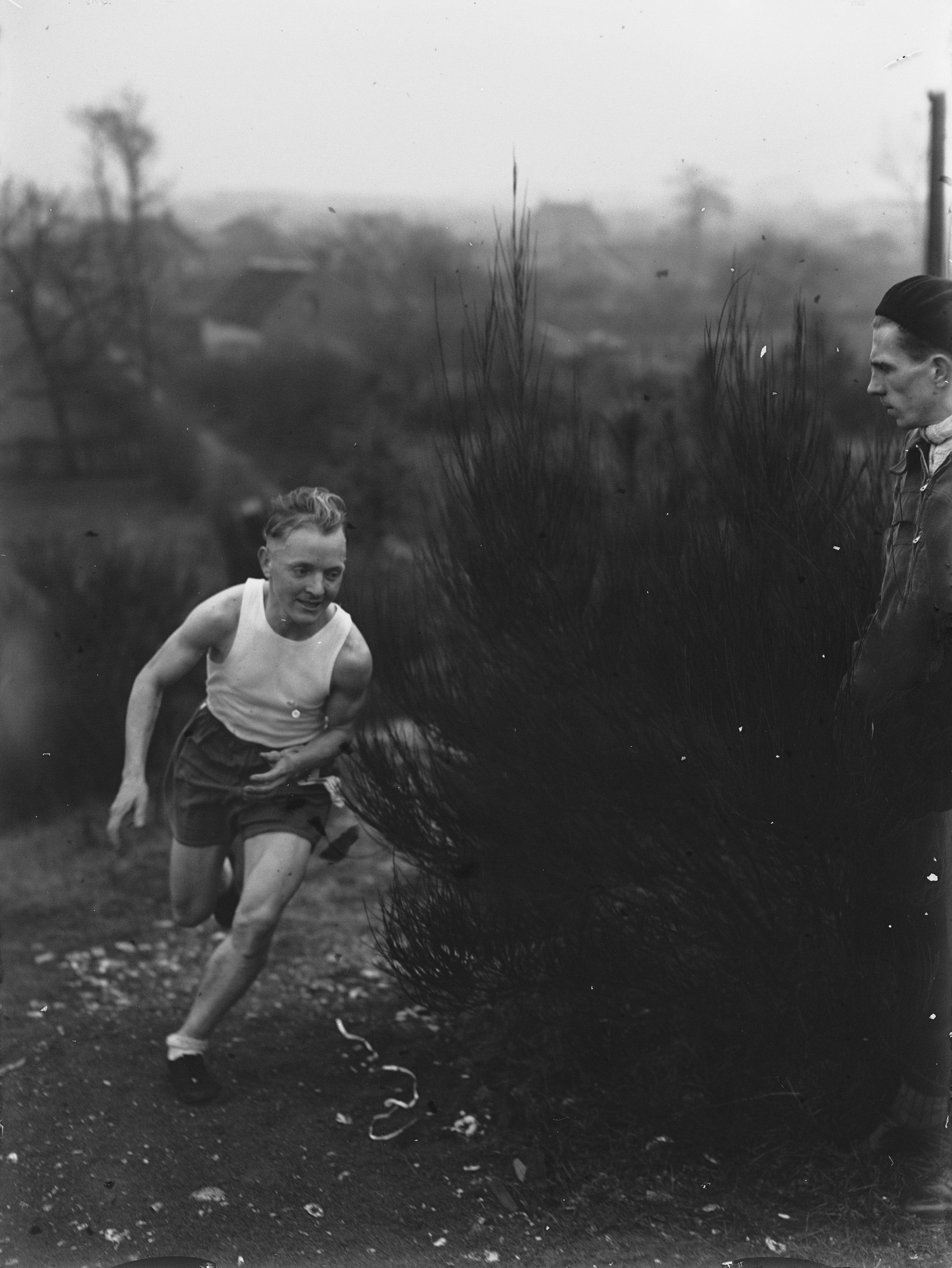 Collectie / Archief : Fotocollectie Anefo Reportage / Serie : [ onbekend ] Beschrijving : 10 kilometer veldloop Van der Zande Datum : 28 januari 1951 Trefwoorden : VELDLOOP Fotograaf : Pot, Harry / Anefo Auteursrechthebbende : Nationaal Archief Materiaalsoort : Glasnegatief Nummer archiefinventaris : bekijk toegang 2.24.01.09 Bestanddeelnummer : 904-4155